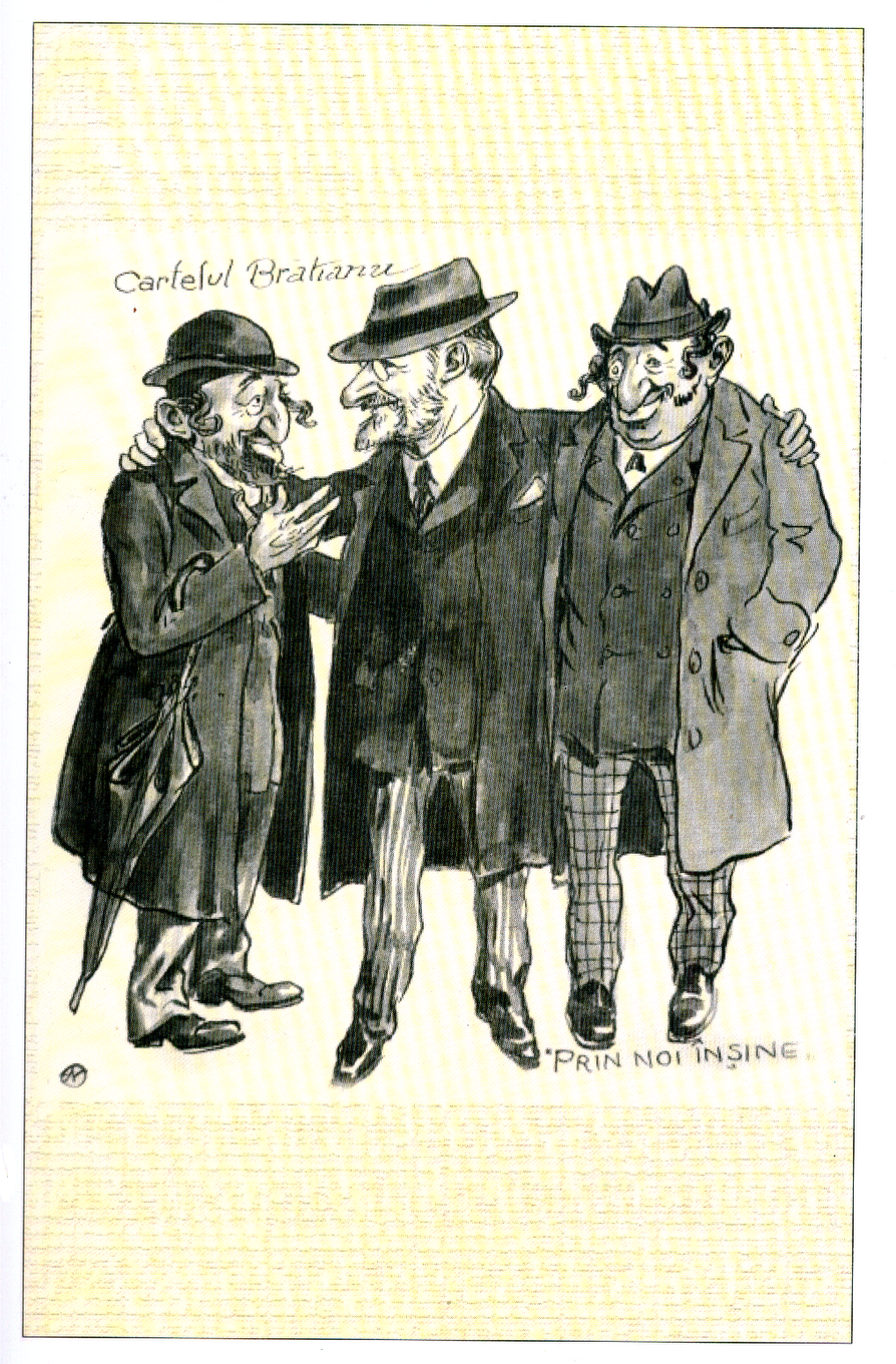 Nicolae Petrescu-Găină - Cartelul Brătienilor (Prin noi înşine).